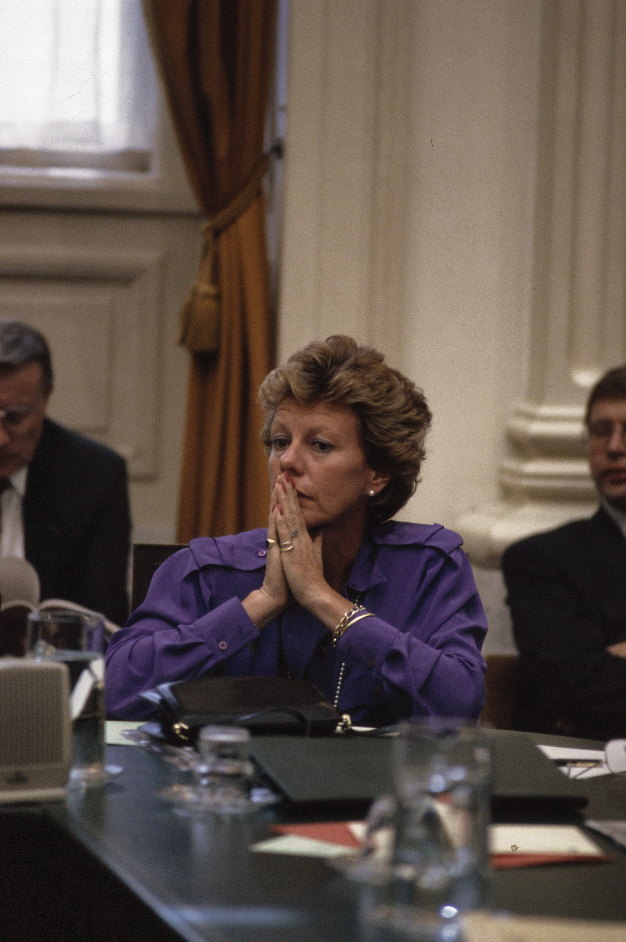 Collectie / Archief : Fotocollectie Anefo Reportage / Serie : [ onbekend ] Beschrijving : Regeringsverklaring Kabinet Lubbers II ; minister Smit Kroes , close Datum : 30 juli 1986 Trefwoorden : kabinetten, ministers, politiek Persoonsnaam : Smit-Kroes, Neelie Fotograaf : Croes, Rob C. / Anefo Auteursrechthebbende : Nationaal Archief Materiaalsoort : Dia (kleur) Nummer archiefinventaris : bekijk toegang 2.24.01.06 Bestanddeelnummer : 253-8980